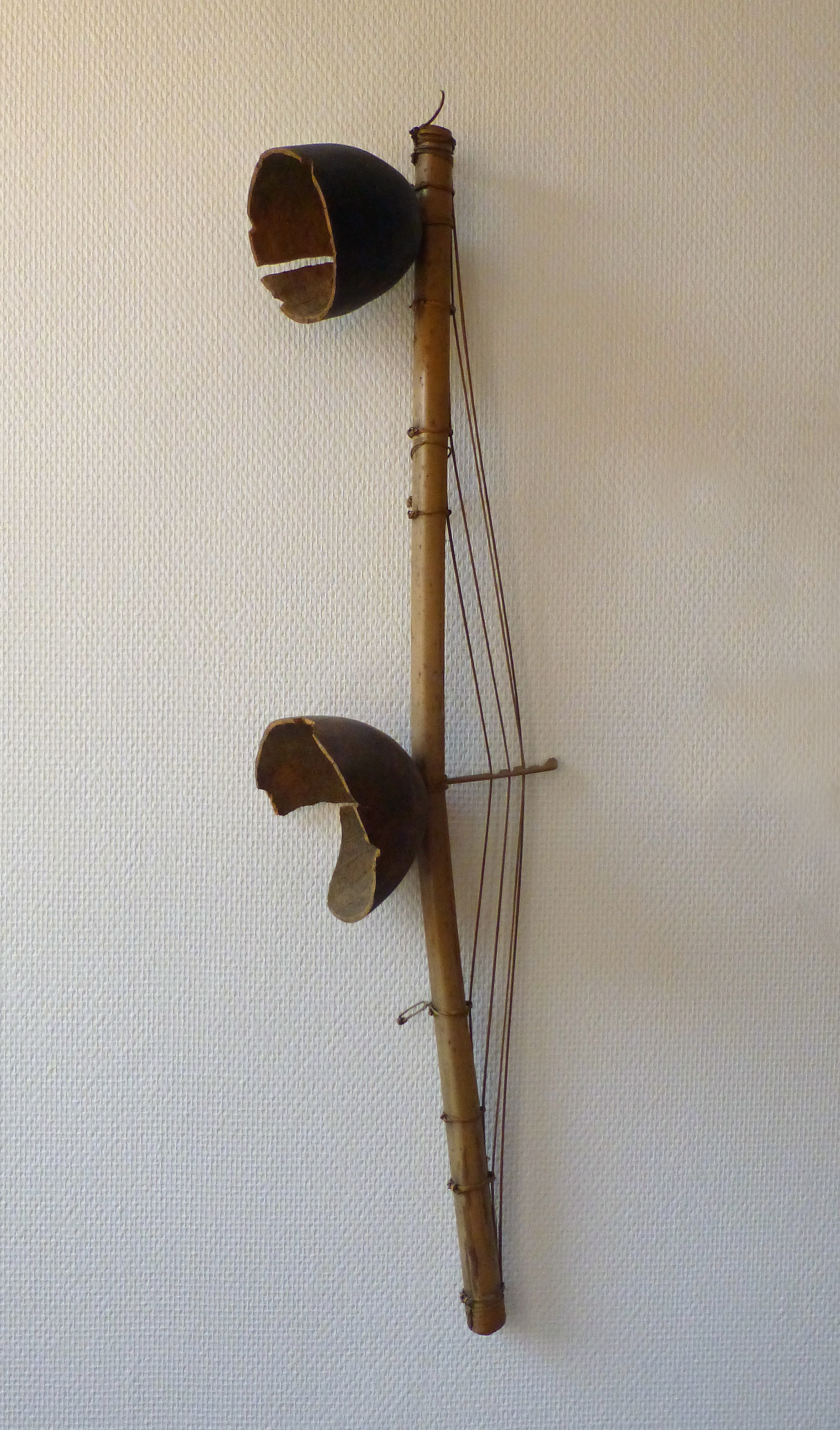 Musée africain de Gunsbach (Haut-Rhin) : mvet